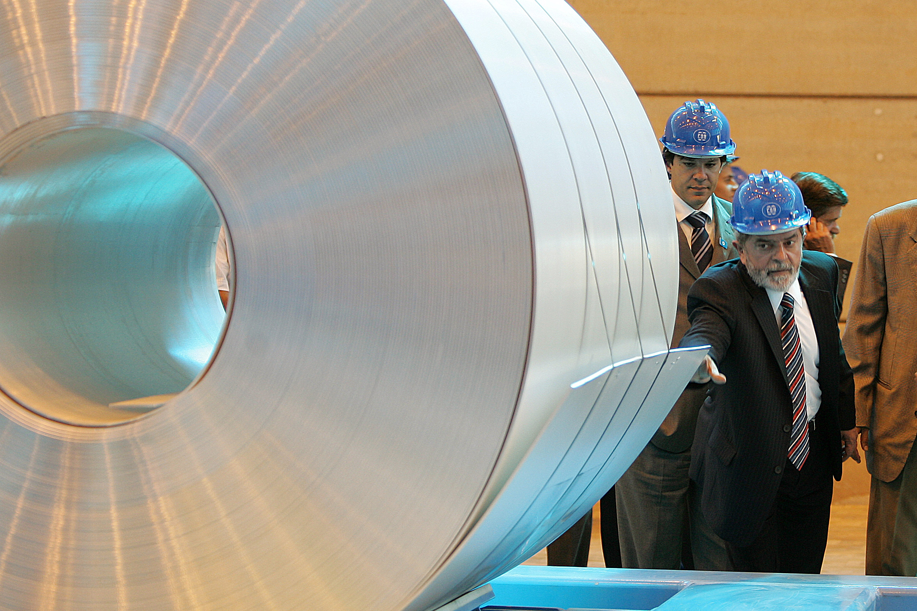 Alumínio / SP - Presidente Lula visita a fábrica da Companhia Brasileira de Alumínio, acompanhado por funcionários da empresa.